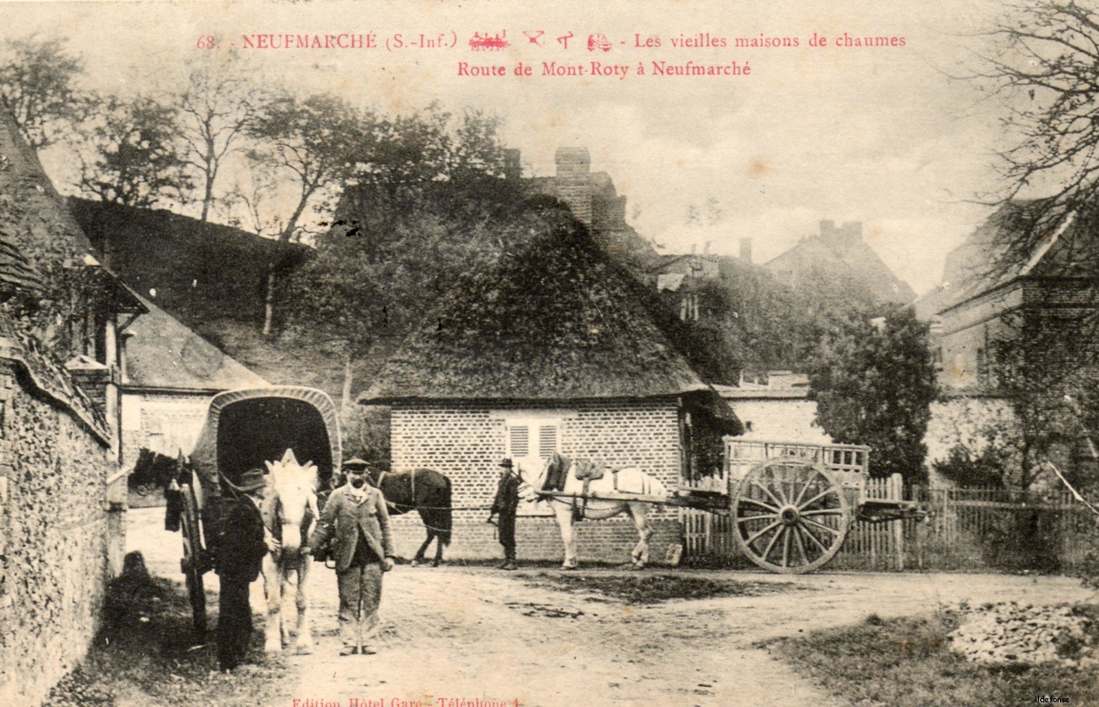 Carte postale